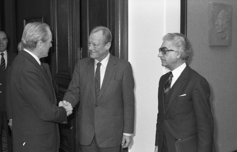 Bundespräsident Karl Carstens empfängt vor seiner Entscheidung über Neuwahlen als Vertreter der SPD deren Vorsitzenden Willy Brandt und den parlamentarischen Geschäftsführer der SPD-Bundestagsfraktion, Gerhard Jahn.